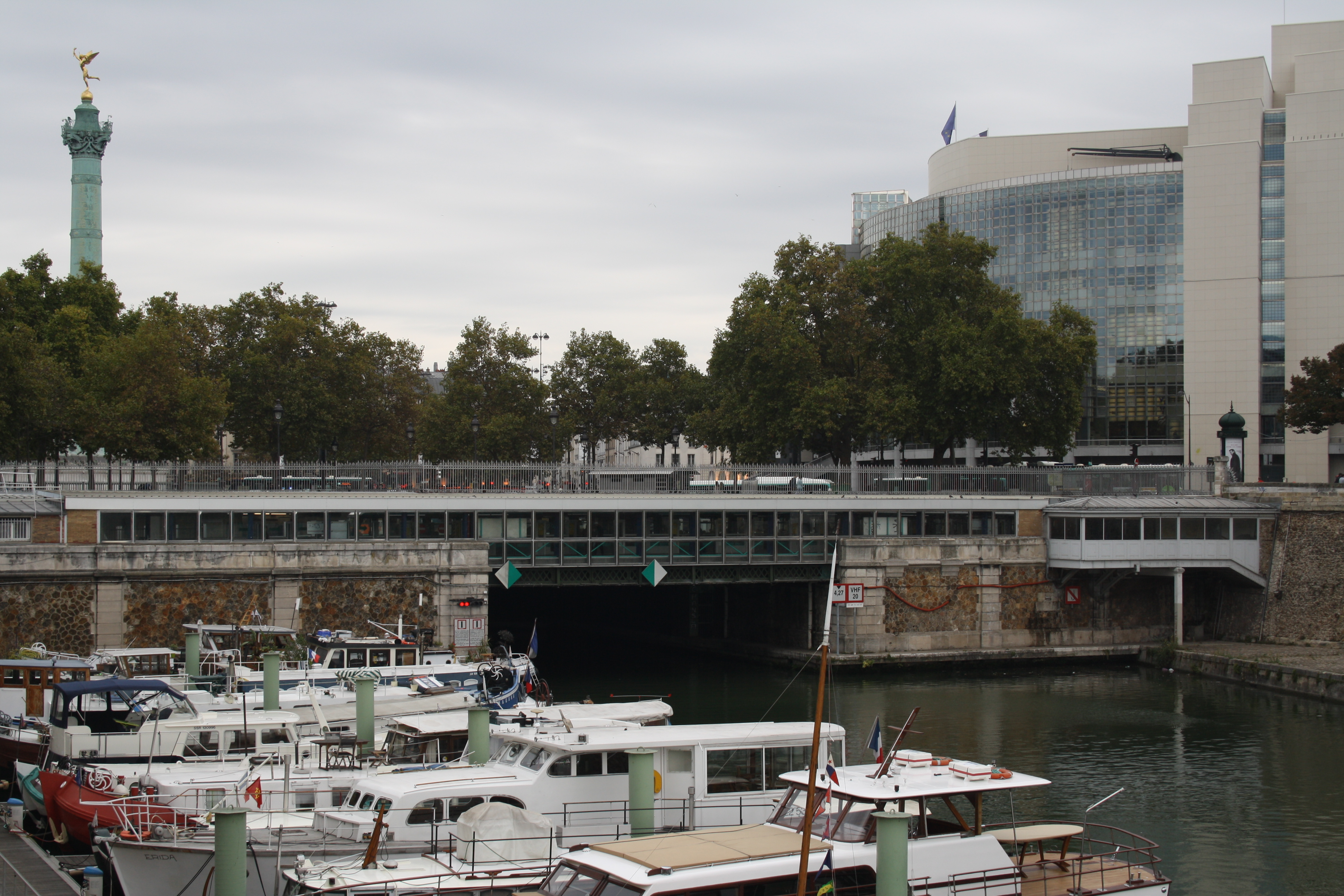 Canal Saint-Martin und Metrostation Bastille Linie 1